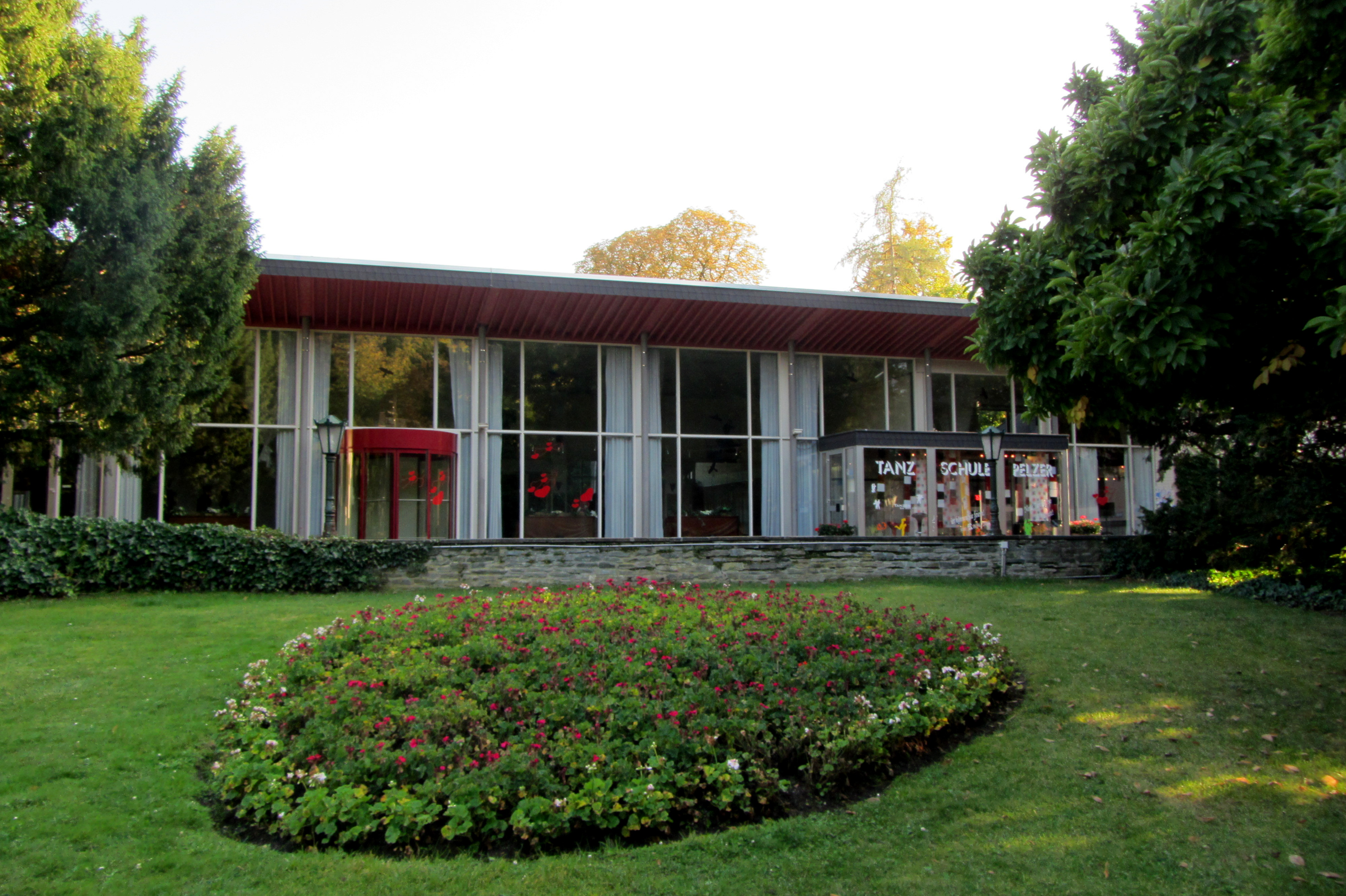 Die Trinkhalle in Bad Soden , heute Tanzschule Pelzer